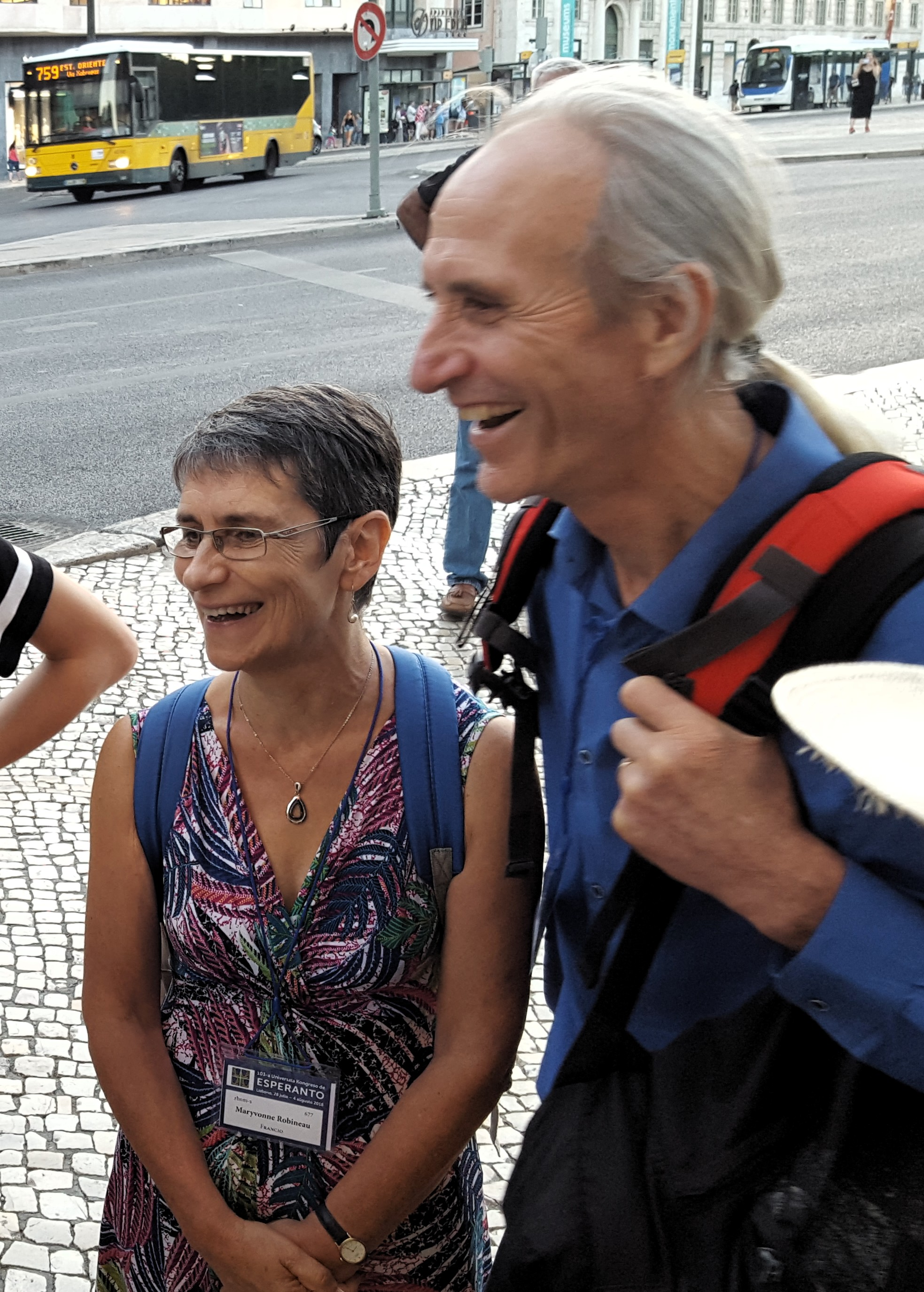 Maryvonne kaj Bruno ROBINEAU en Lisbono, UK 2018.